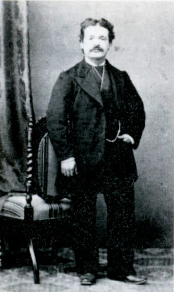 Antonmaria Bonetti (1849 – 1896) Archivio